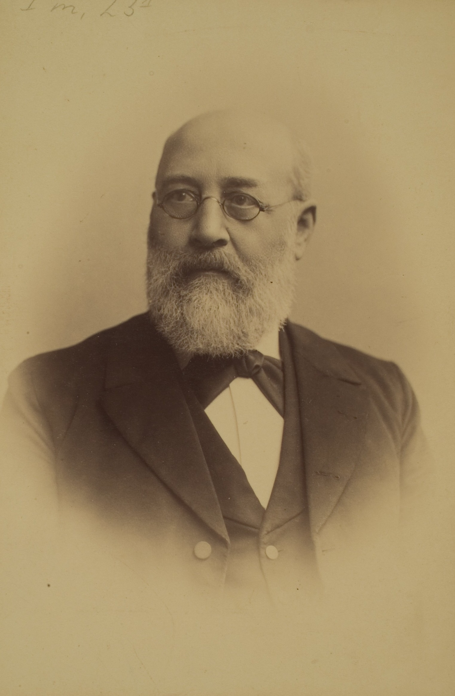 Ernst Otto Adalbert Merx, Theologe, 1875–1909 Professor in Heidelberg